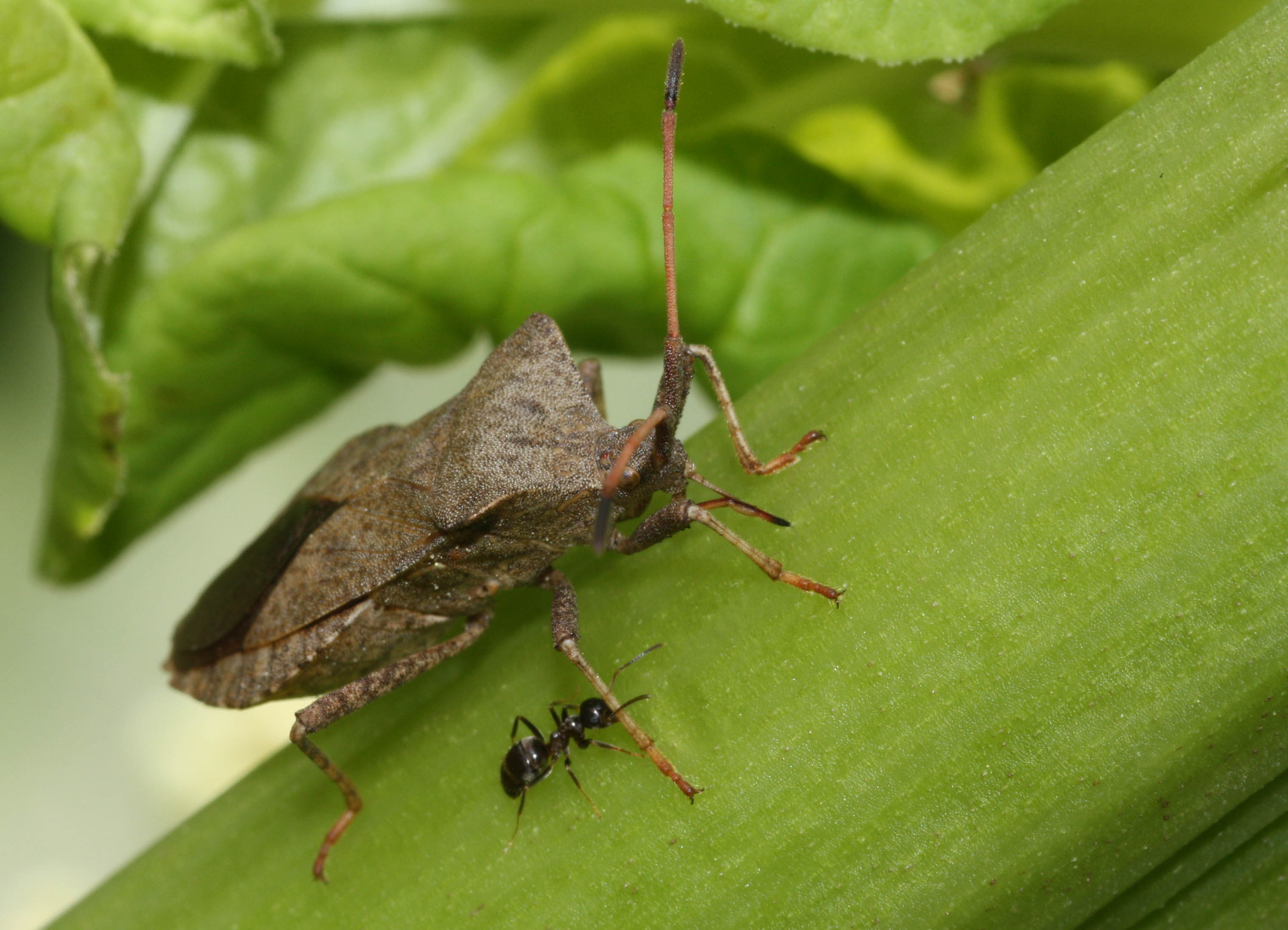 Coreus marginatus, Saumwanze saugt an Rhabarberstängel